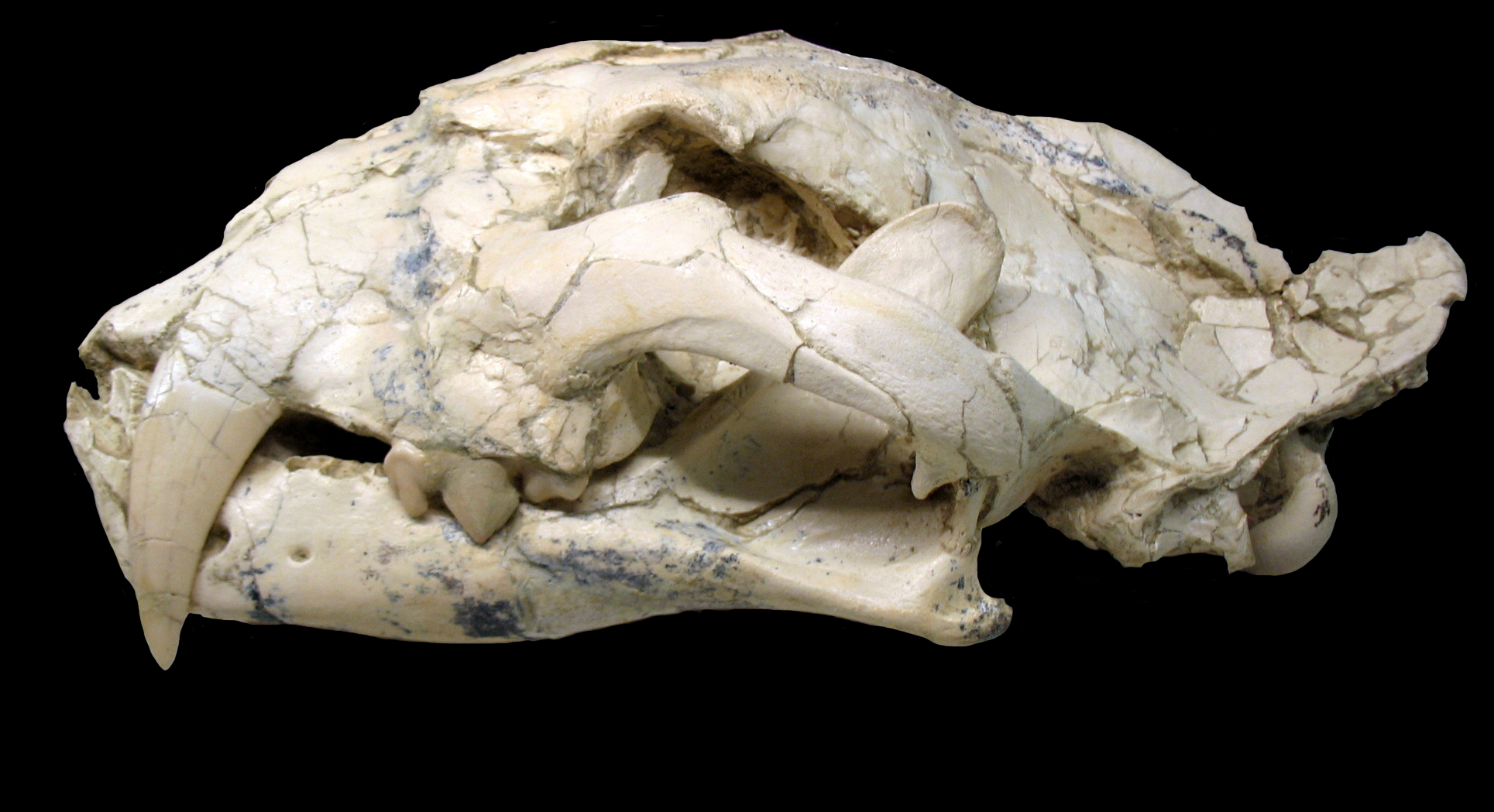 Cráneo de Machairodus aphanistus hembra. Yacimientos del Cerro de los Batallones, Torrejón de Velasco, Madrid, España. Exposición temporal "La colina de los tigres dientes de sable. Los yacimientos miocenos del cerro de los Batallones (Torrejón de Velasco, Comunidad de Madrid)" en el Museo Arqueológico Regional (MAR), Alcalá de Henares (Madrid)